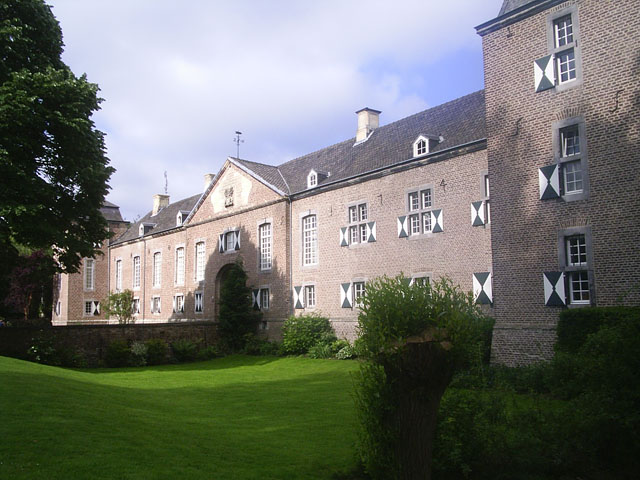 Kasteel Haeren (Voerendaal). Foto zelf gemaakt, 6 juni 2006.